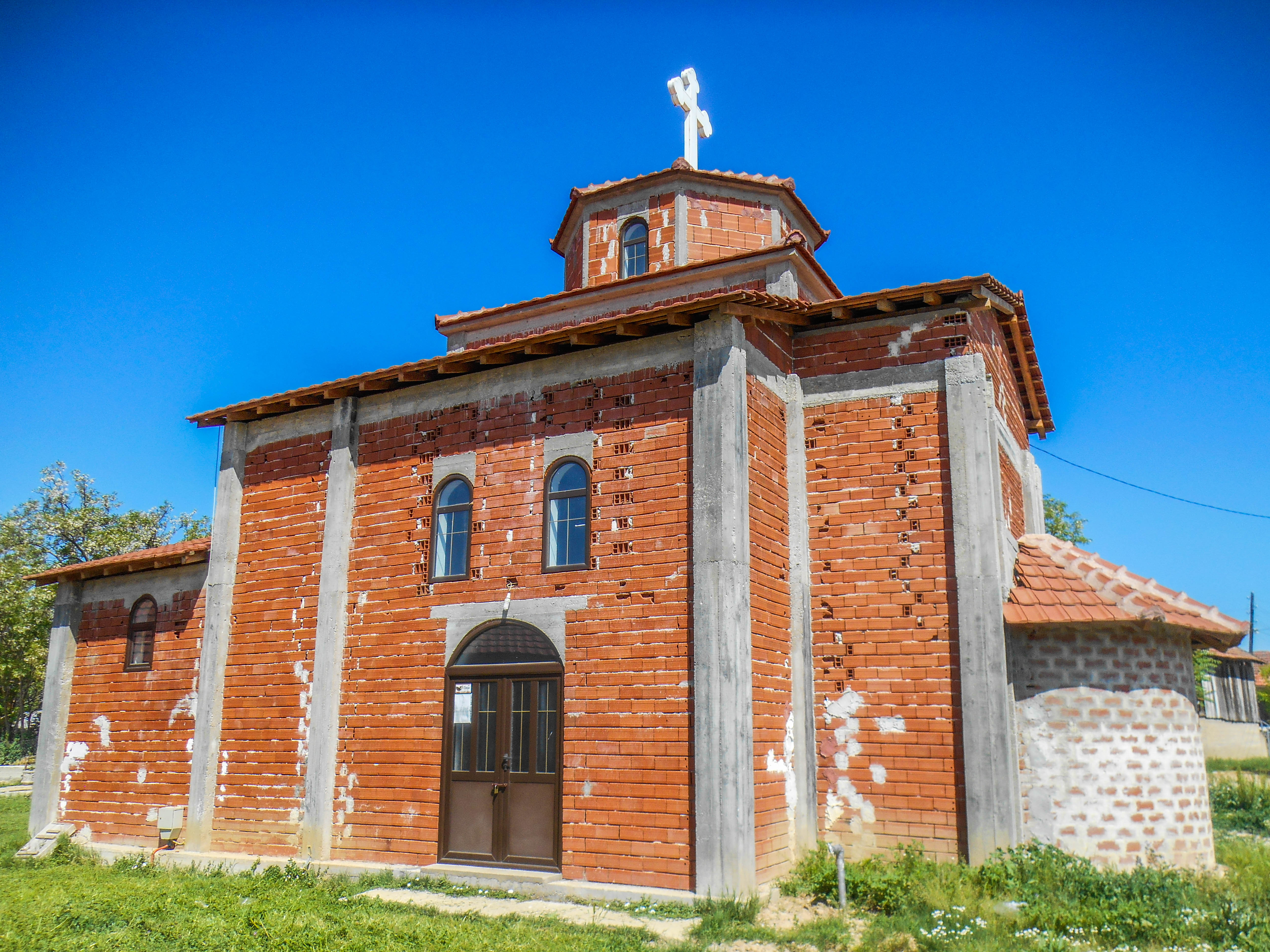 Црква „Св. Спас“ - Ангелци